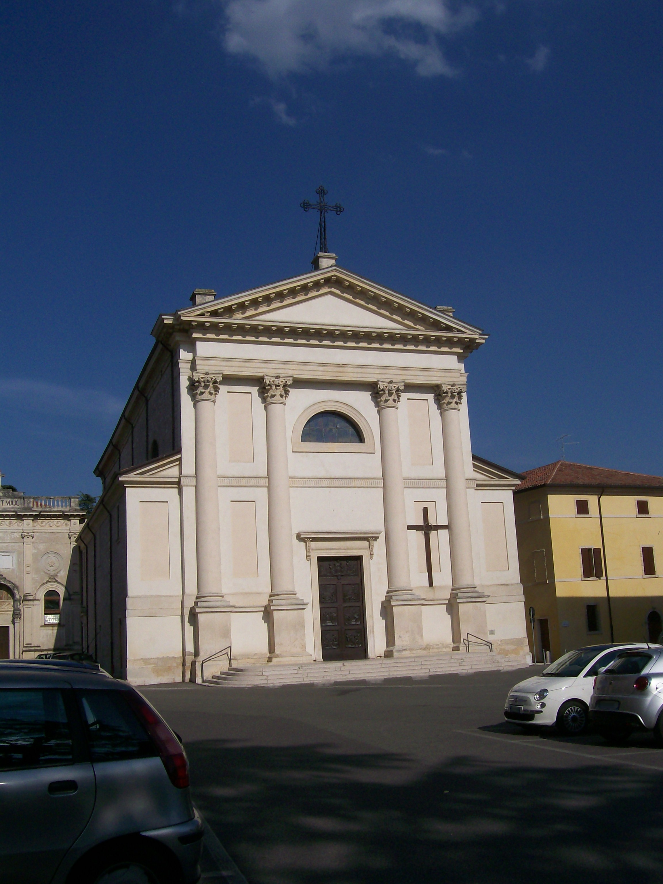 Chiesa parrocchiale di S. Giorgio in Illasi (VR).